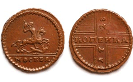 Копейка 1728 года